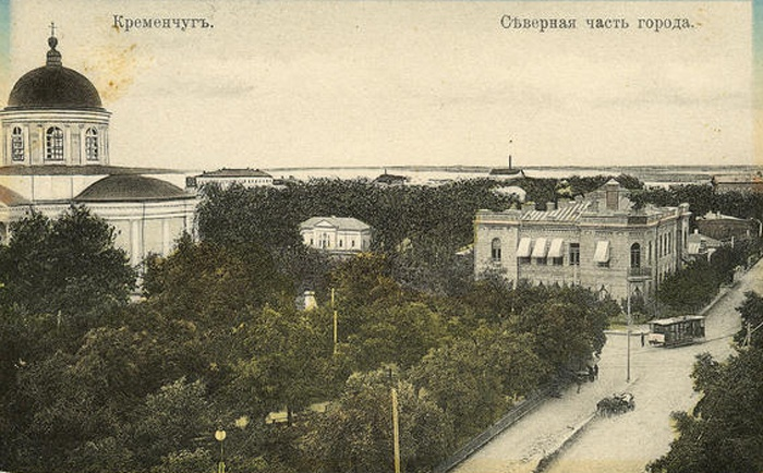 Трамвай в Кременчугe возле здания Государственного банка. Слева виден Успенский собор и Почтовый сквер (ныне не существуют)